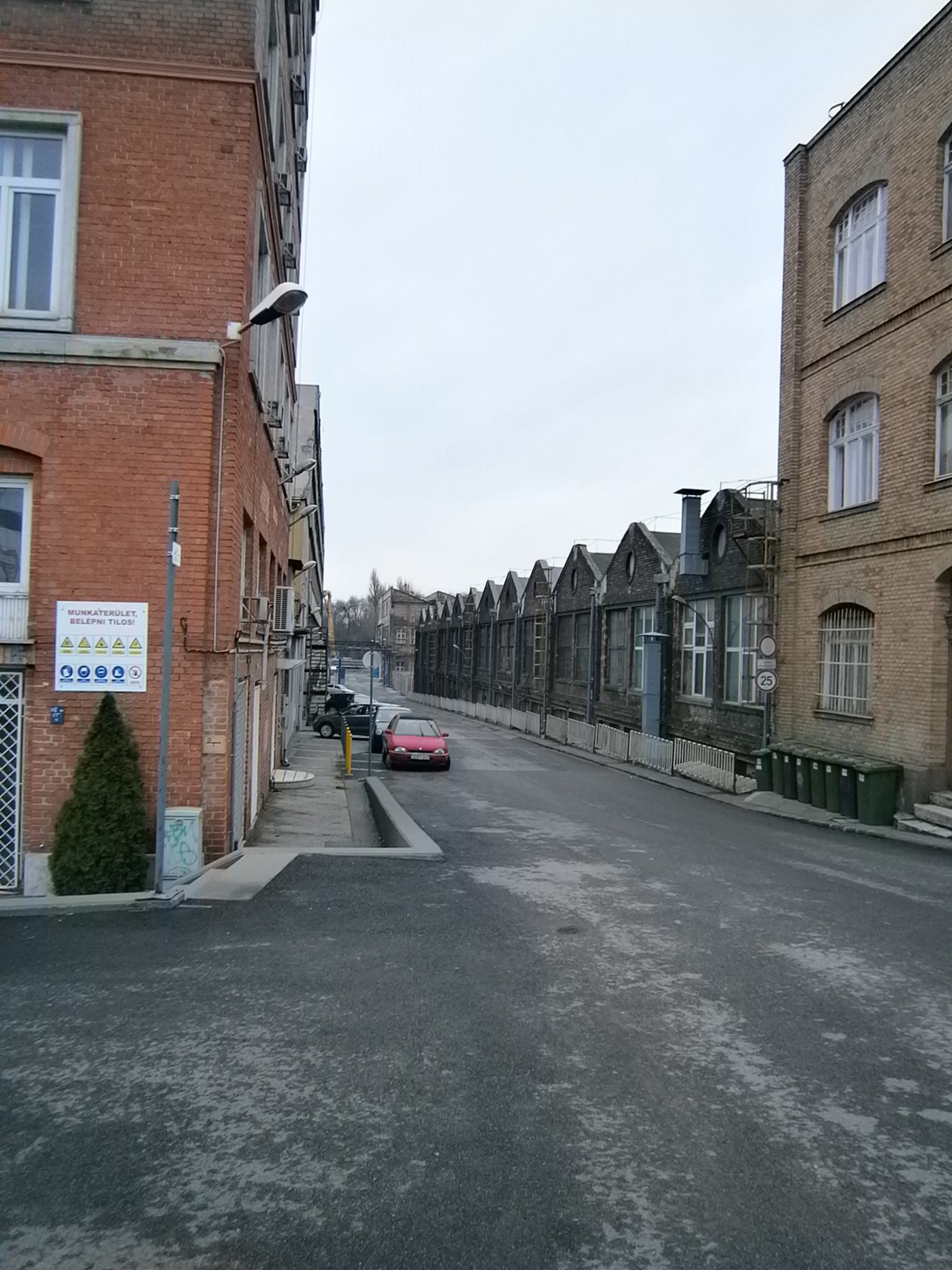 A budapesti Gumigyár épületei a Kerepesi út felől nézve.